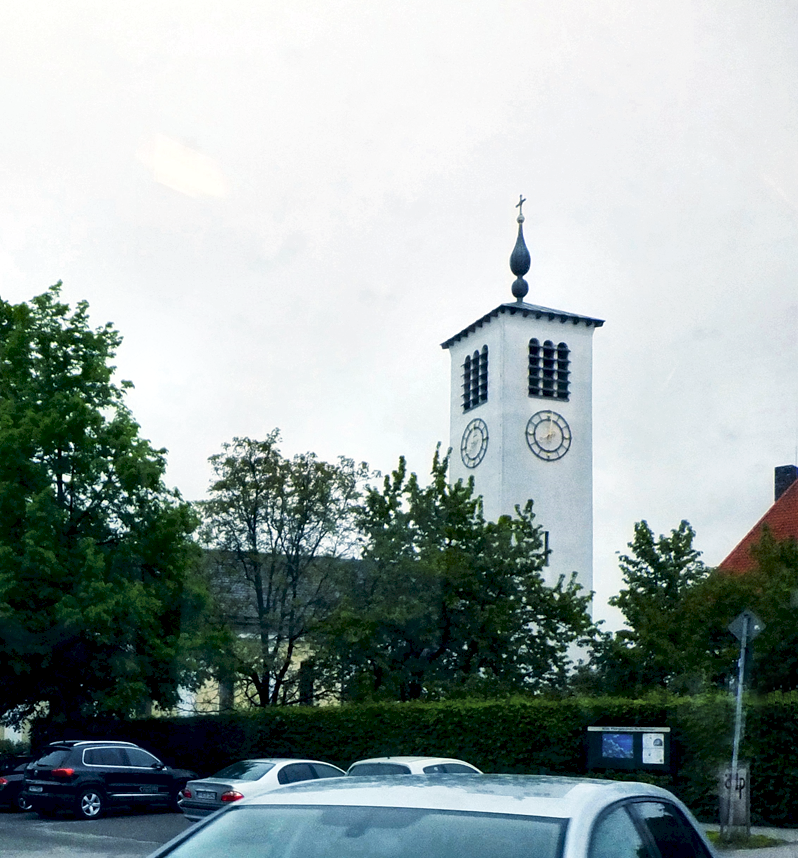 Lohhof, Kirche St. Korbinian